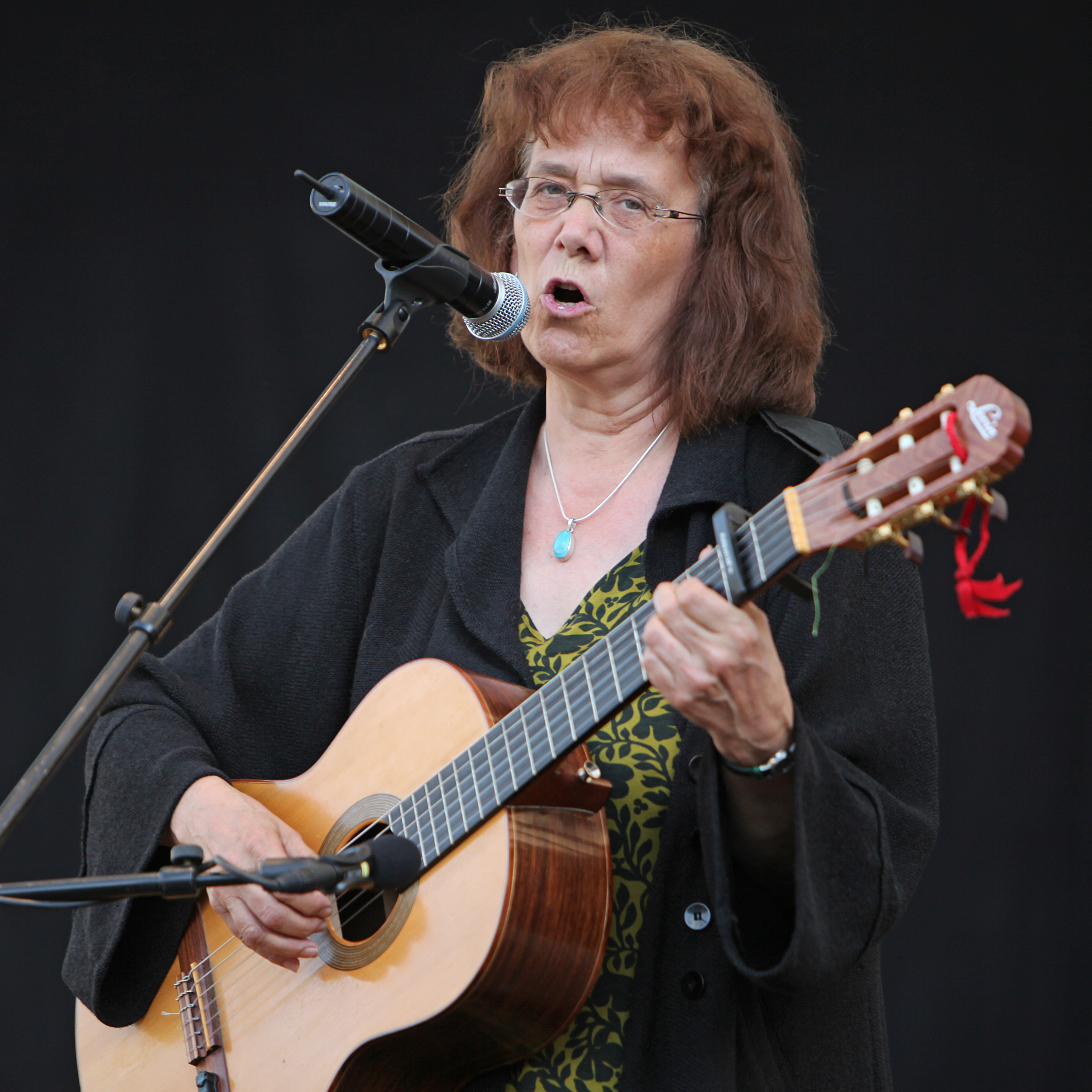 Helene Bohman Blomqvist at Kungsträdgården, Stockholm 2009